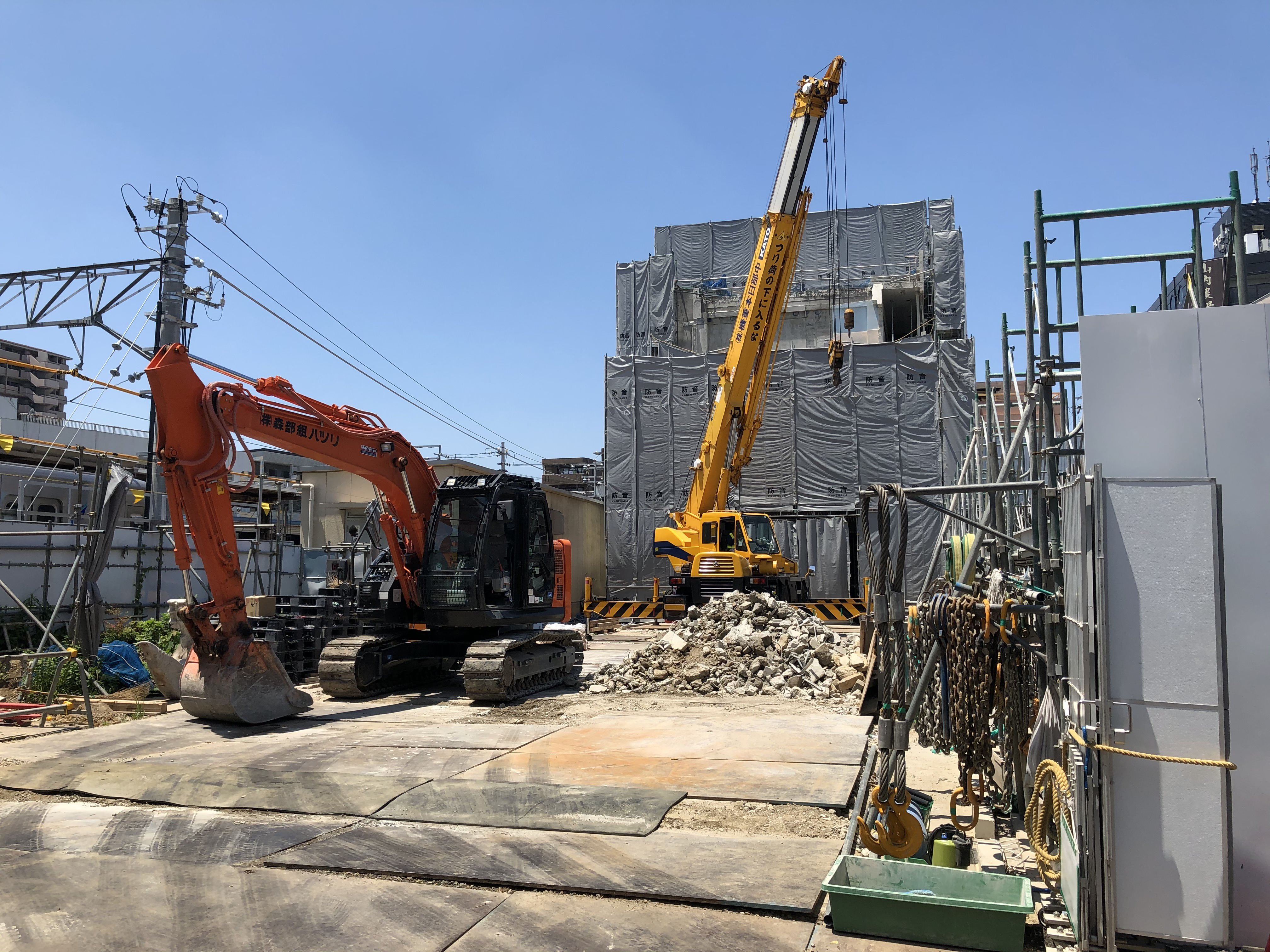 橋上駅化工事中の新安城駅